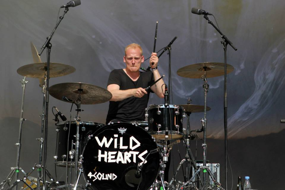 Trommeslager Morten Hellborn under Dúnés Wild Hearts Tour. Her ved koncert på Nibe Festival 2013.